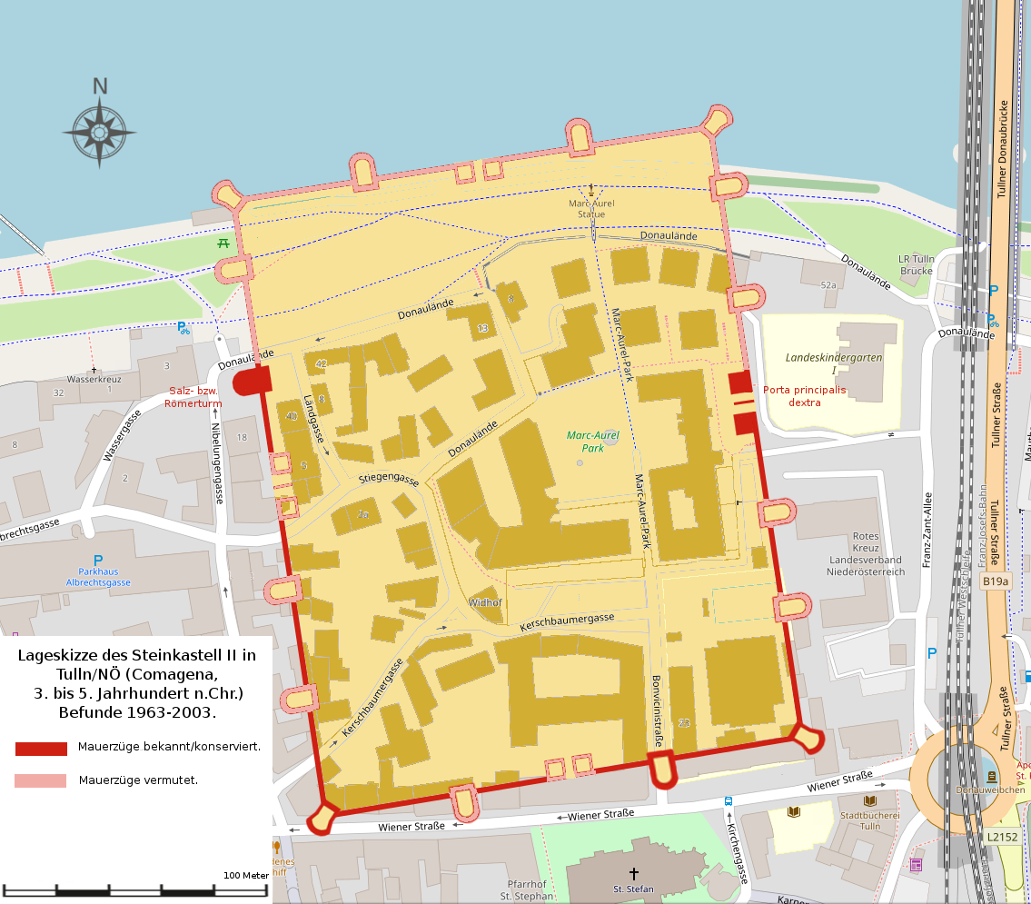 Lage- und Befundskizze des Steinlager II Comagena in Tulln (Ö), Befunde 1963-2003, Bauzustand 3. bis 5. Jahrhundert n.Chr.